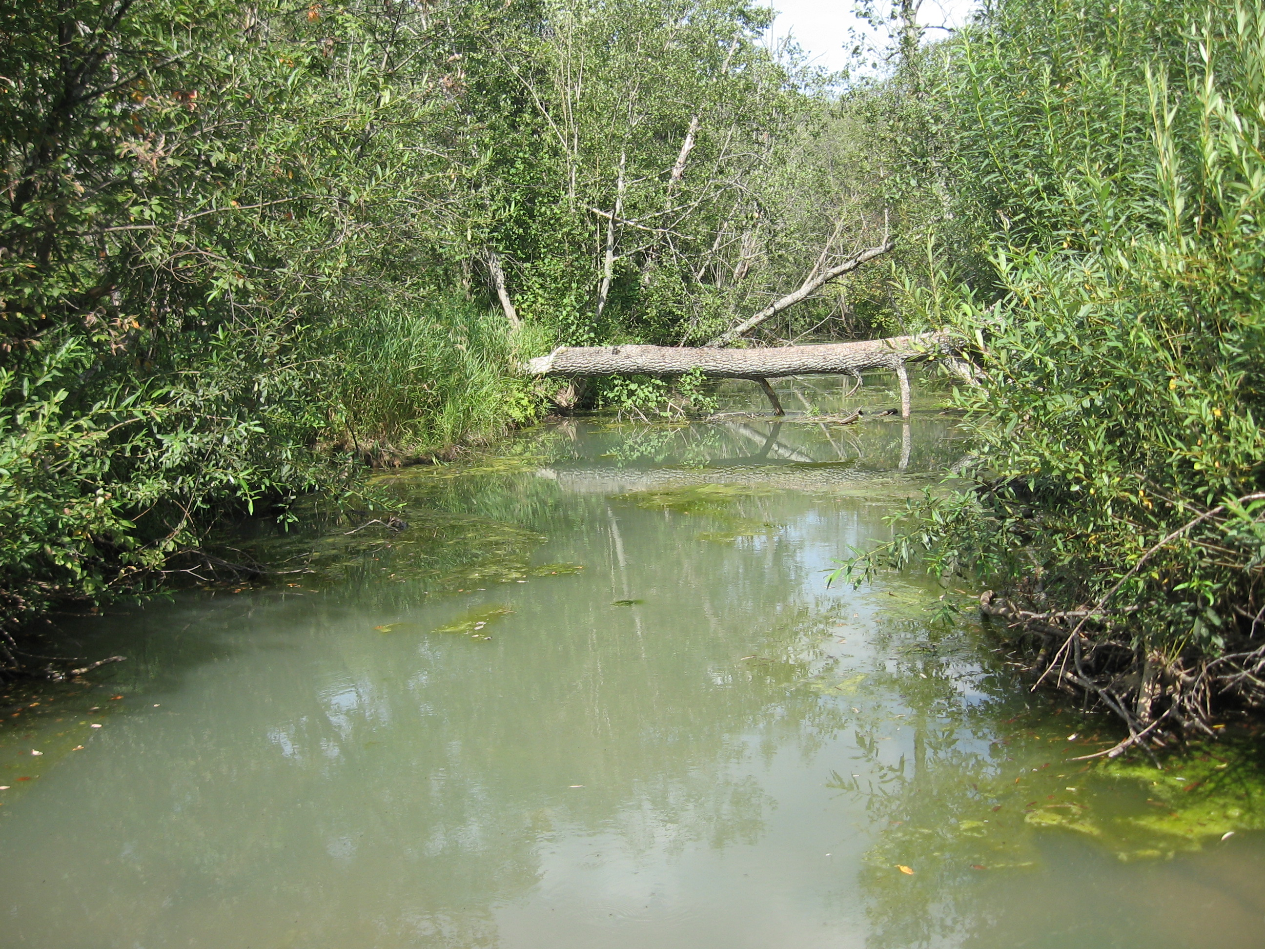 Выход реки Яман-Елга на поверхность